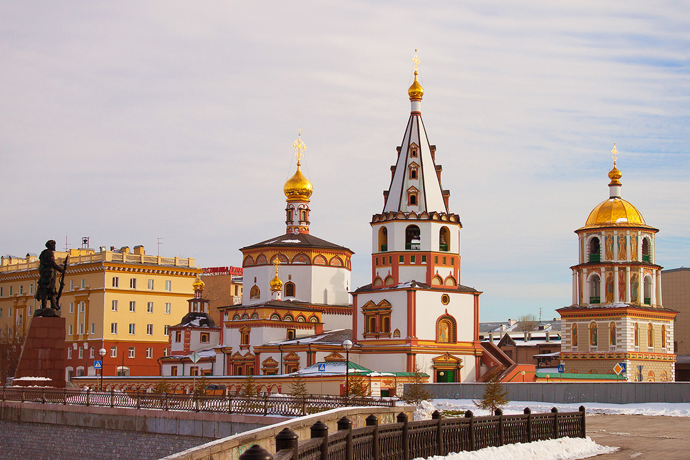 ансамбль Богоявленского собора (Иркутская область, Иркутск, Нижняя Набережная улица, 2, Сухэ-Батора улица)